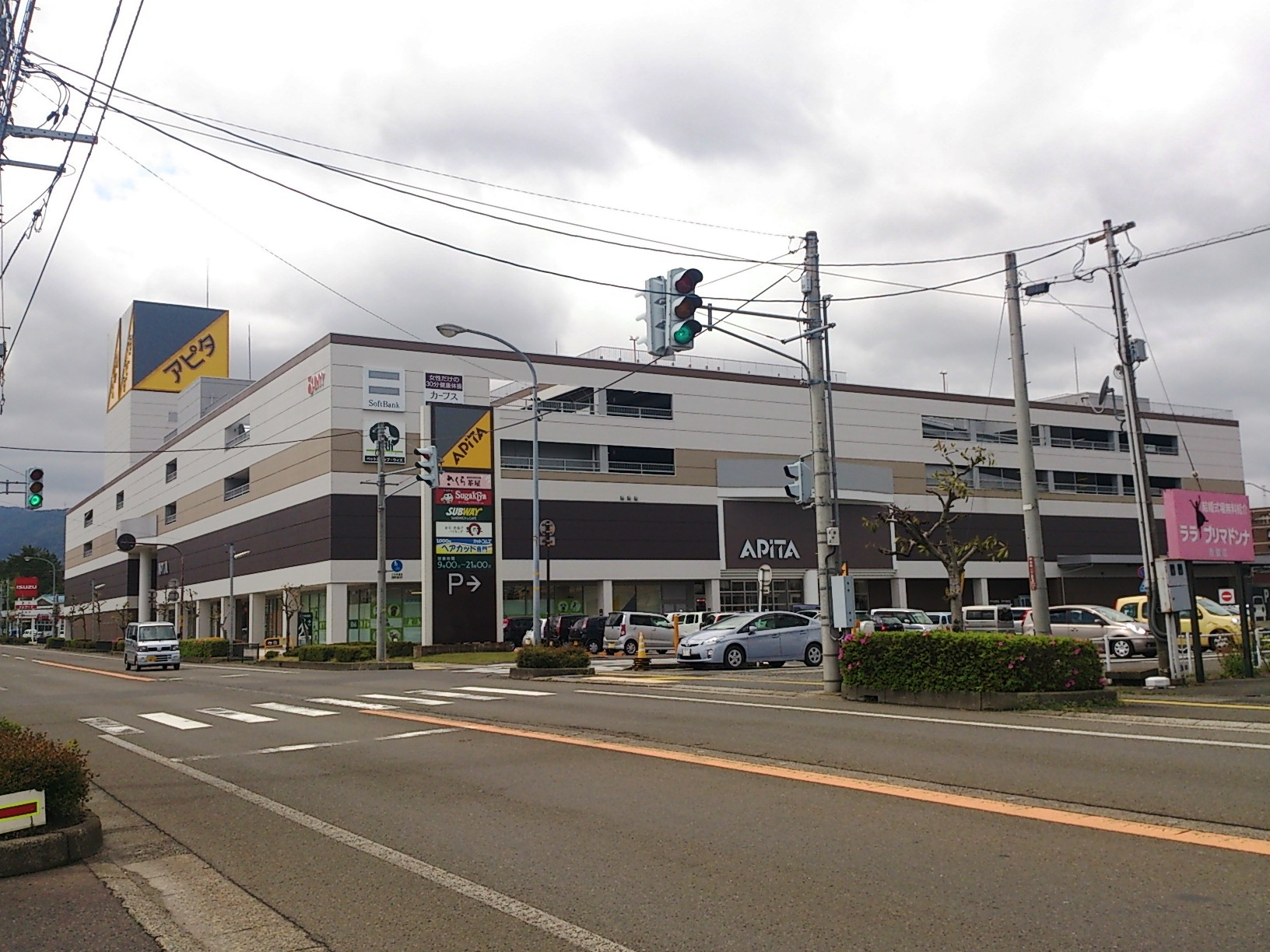 アピタ敦賀店